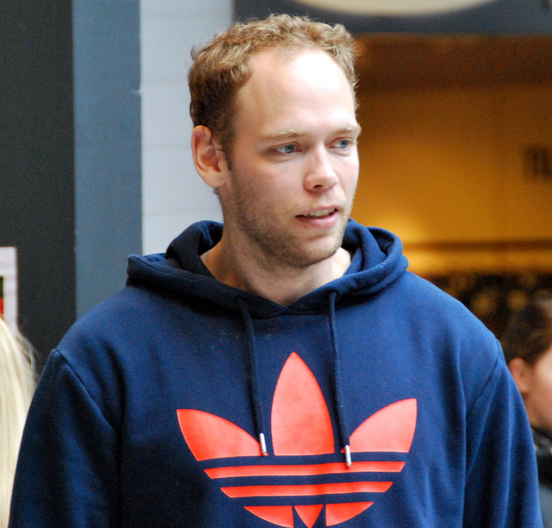 Håndboldspilleren Mads Ø. Nielsen fra Bjerringbro-Silkeborg.